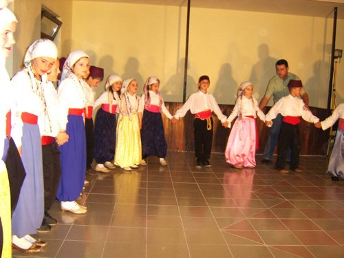 KUD Sefko Avdic Tarevci